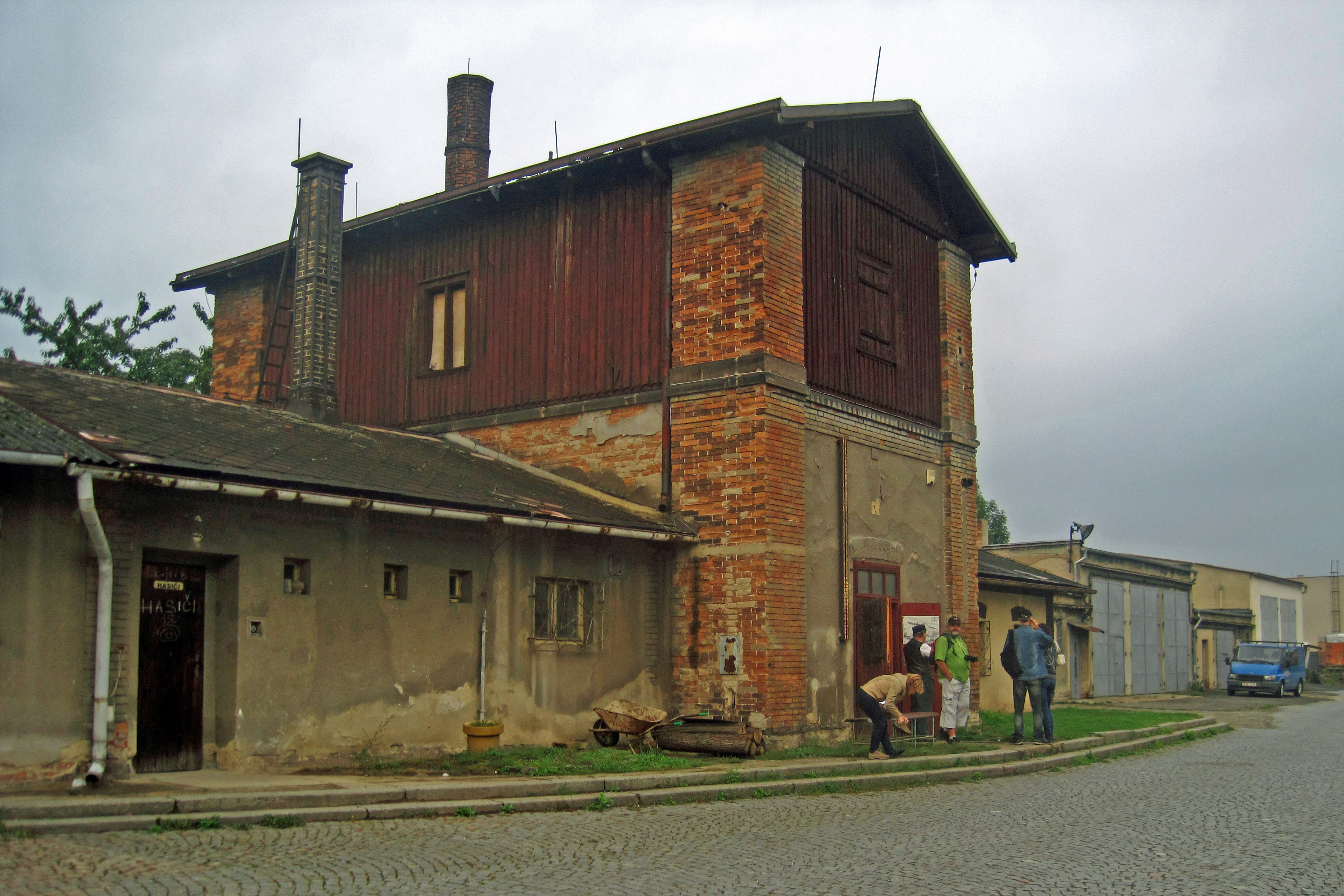 Parní vodárna s cisternou, U Stanice 822/11, jižní část nádraží Ústí nad Labem-Střekov, Střekov (místní část).